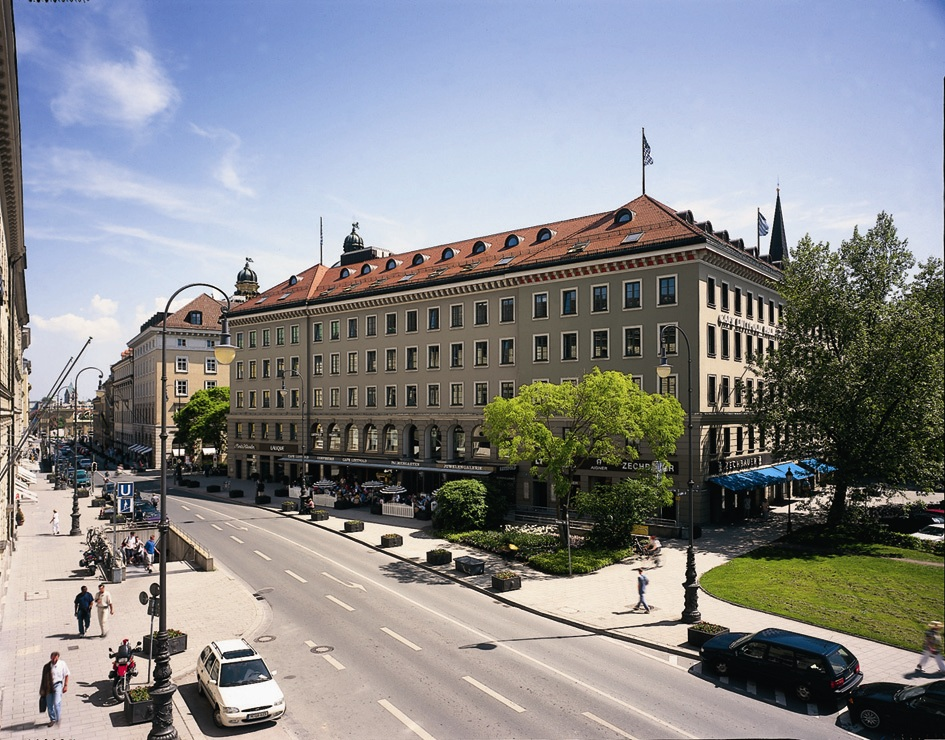 Der Luitpoldblock an der Briennerstraße